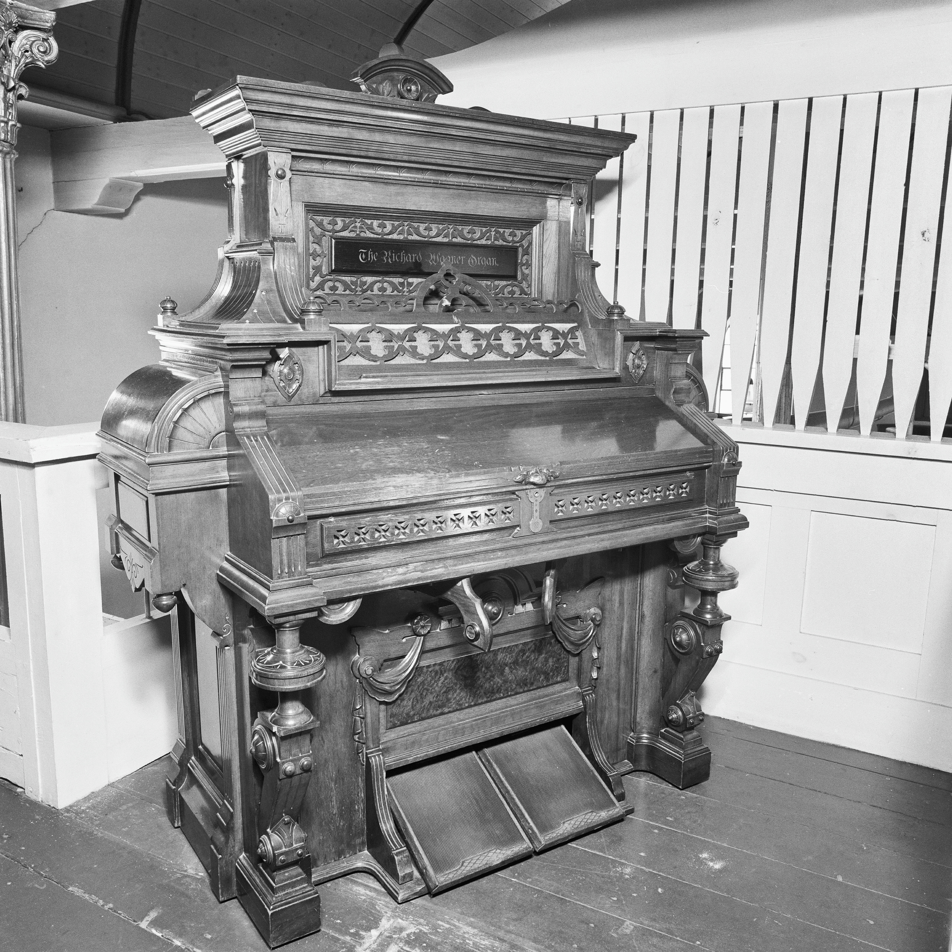 Nederlands Hervormde Kerk: harmonium achter nep orgelfront